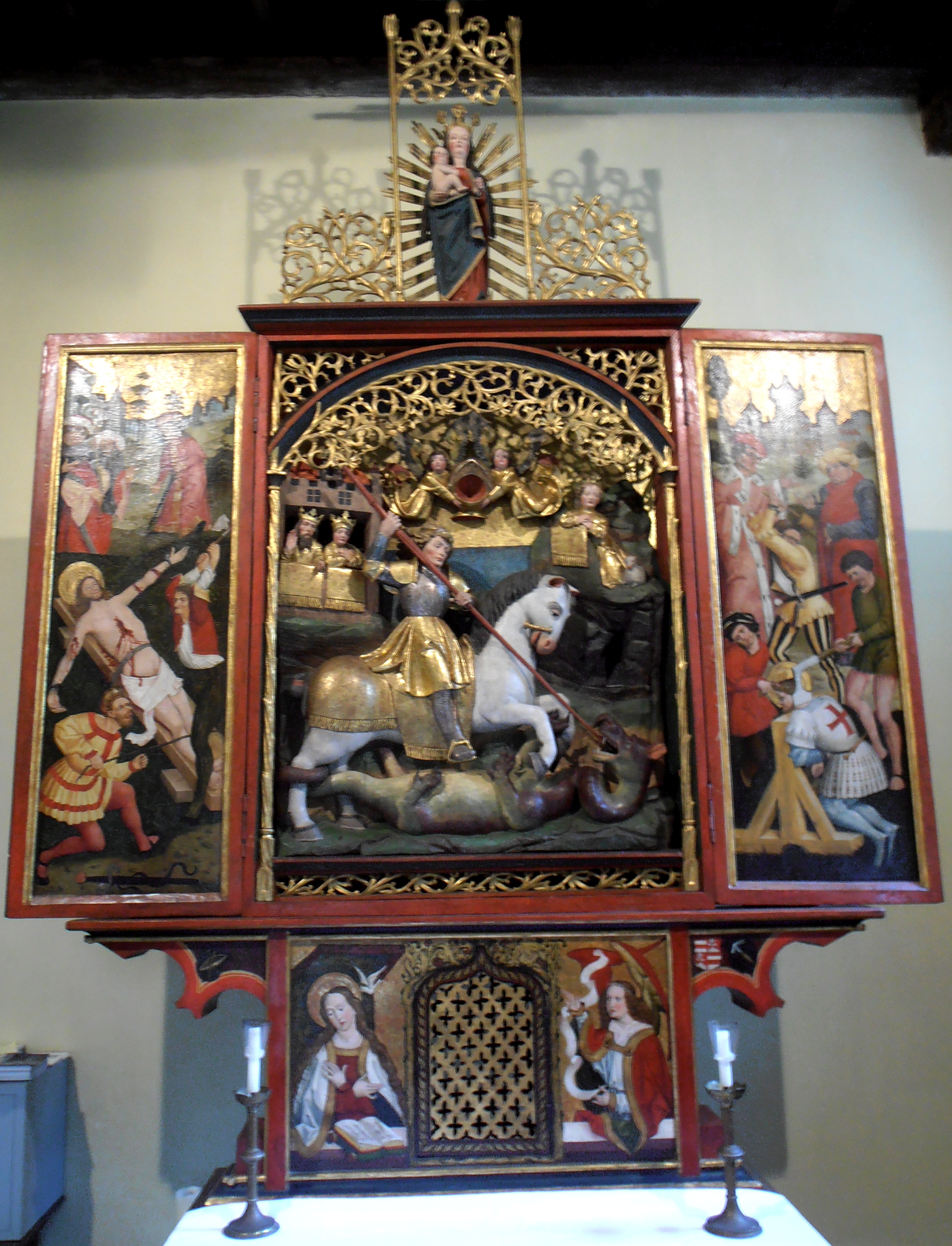 St. Georg (alt) Muenchen-Milbertshofen Altar Werktagsseite (geöffnet)